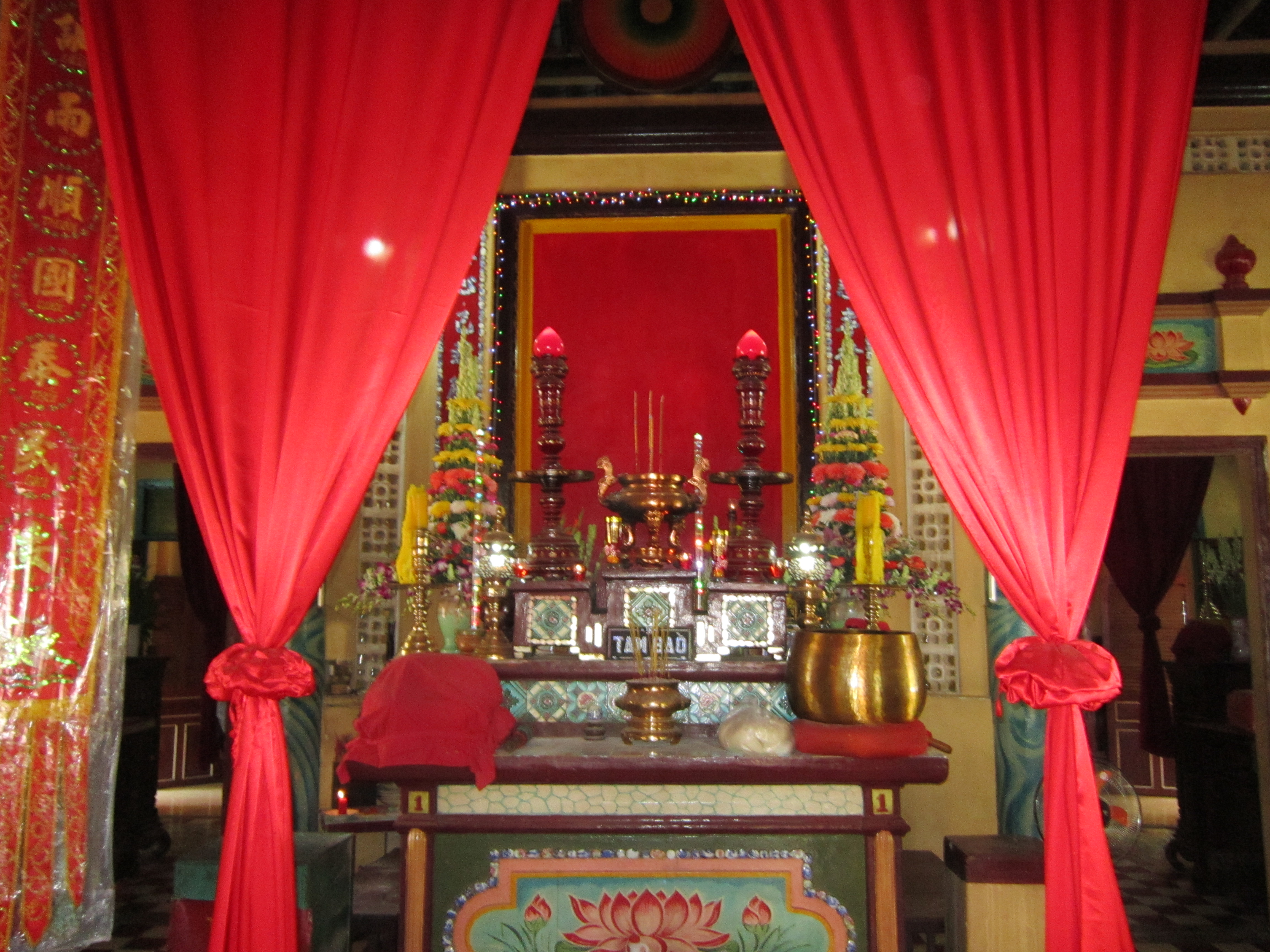 Bàn thờ Tam bảo trong chùa Thới Sơn, thuộc xã Thới Sơn, huyện Tịnh Biên, An Giang, Việt Nam.